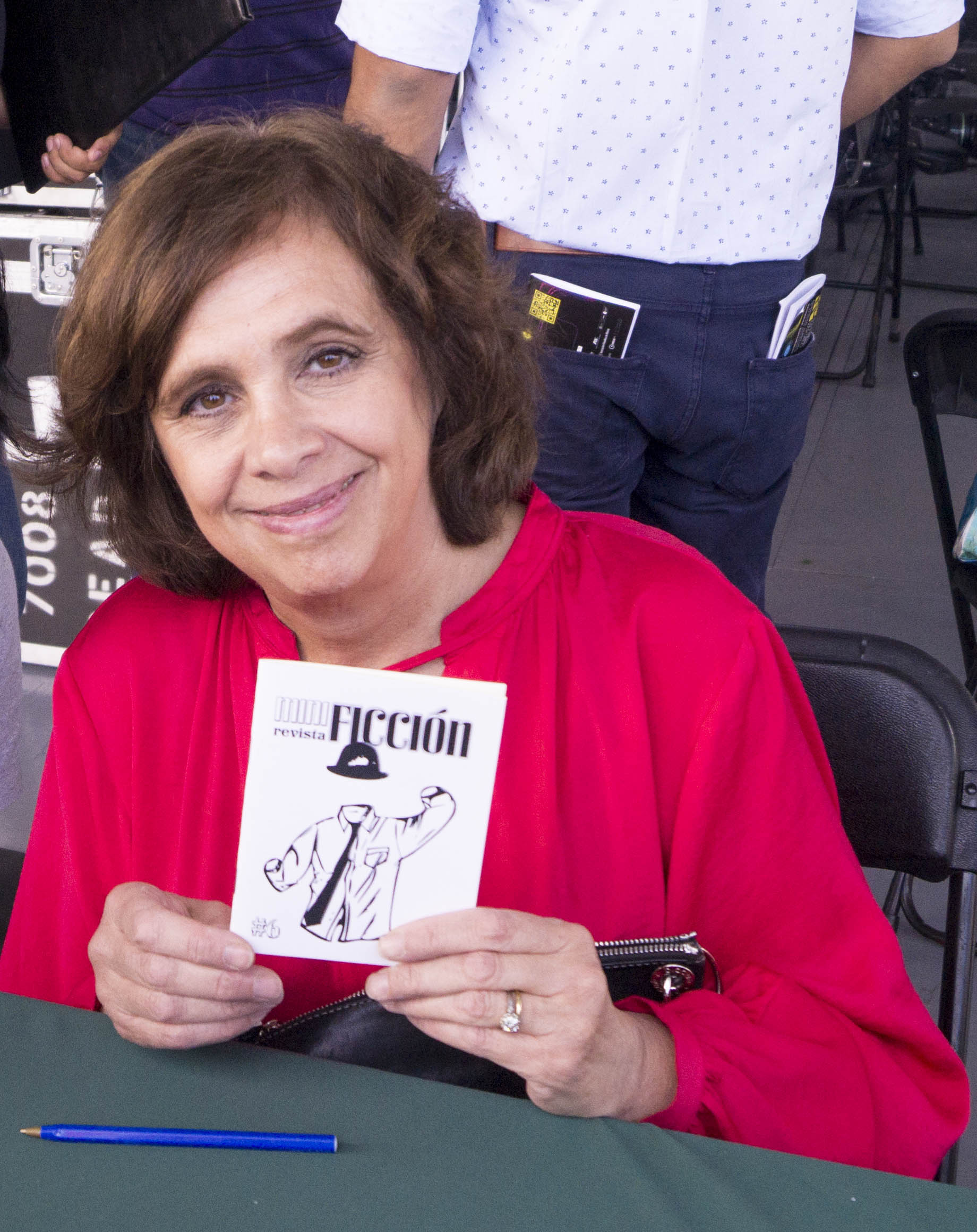 Ana María Shua con Revista Minificción en el I Encuentro Iberoamericano de Minificción, Ciudad de México.